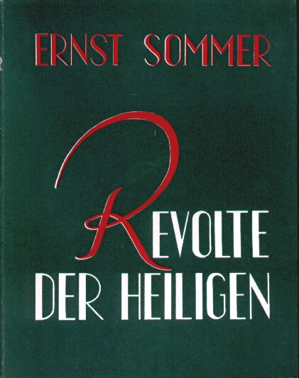 Ernst Sommer: Revolte der Heiligen. Erzaehlung. Mexico, El Libro Libre, 1944 (Erste Ausgabe)